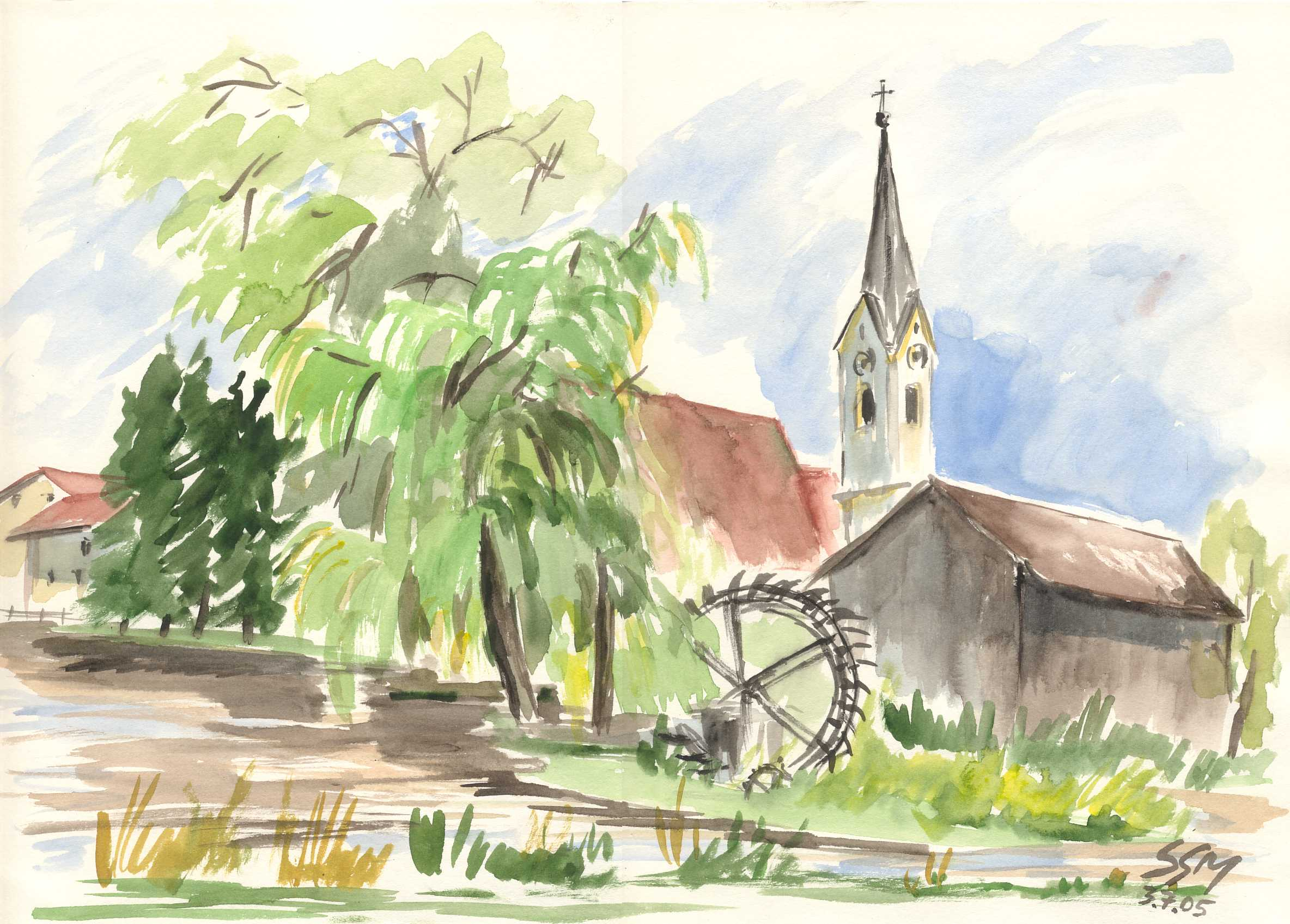 Schamhaupten, beim "Schambach-Ursprung". Aquarell von Siegfried Schieweck-Mauk, Eichstätt, 27 x 40 cm, Werk-Nr. 1209